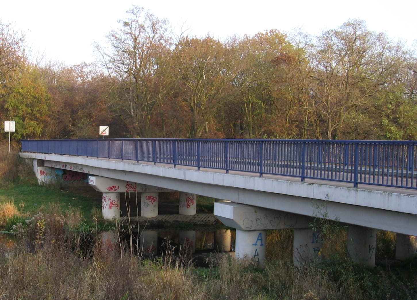 Wrocław, Poland Sołtysowicki Bridge over Widawa River